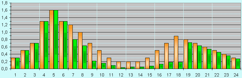 Beispiel für ein modifiziertes Basalratenprofil. Die Absenkungen wurden vorgenommen, um beim Sport durch den erhöhten Kohlehydratverbrauch und die verbesserte Insulinwirkung nicht zu unterzuckern. Legende: orange = ursprüngliches Profil grün = durch Basalratenabsenkungen und Pumpenstopps zum Duschen bewirkte tatsächlich abgegebene Basalrate Das ist mein eigenes Profil vom 21.10.2006. Erstellt von mir selbst mit Excel.